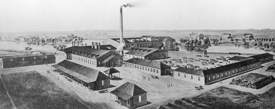 Бумажная фабрика Роджерса и Рейнера (Царскославянская)